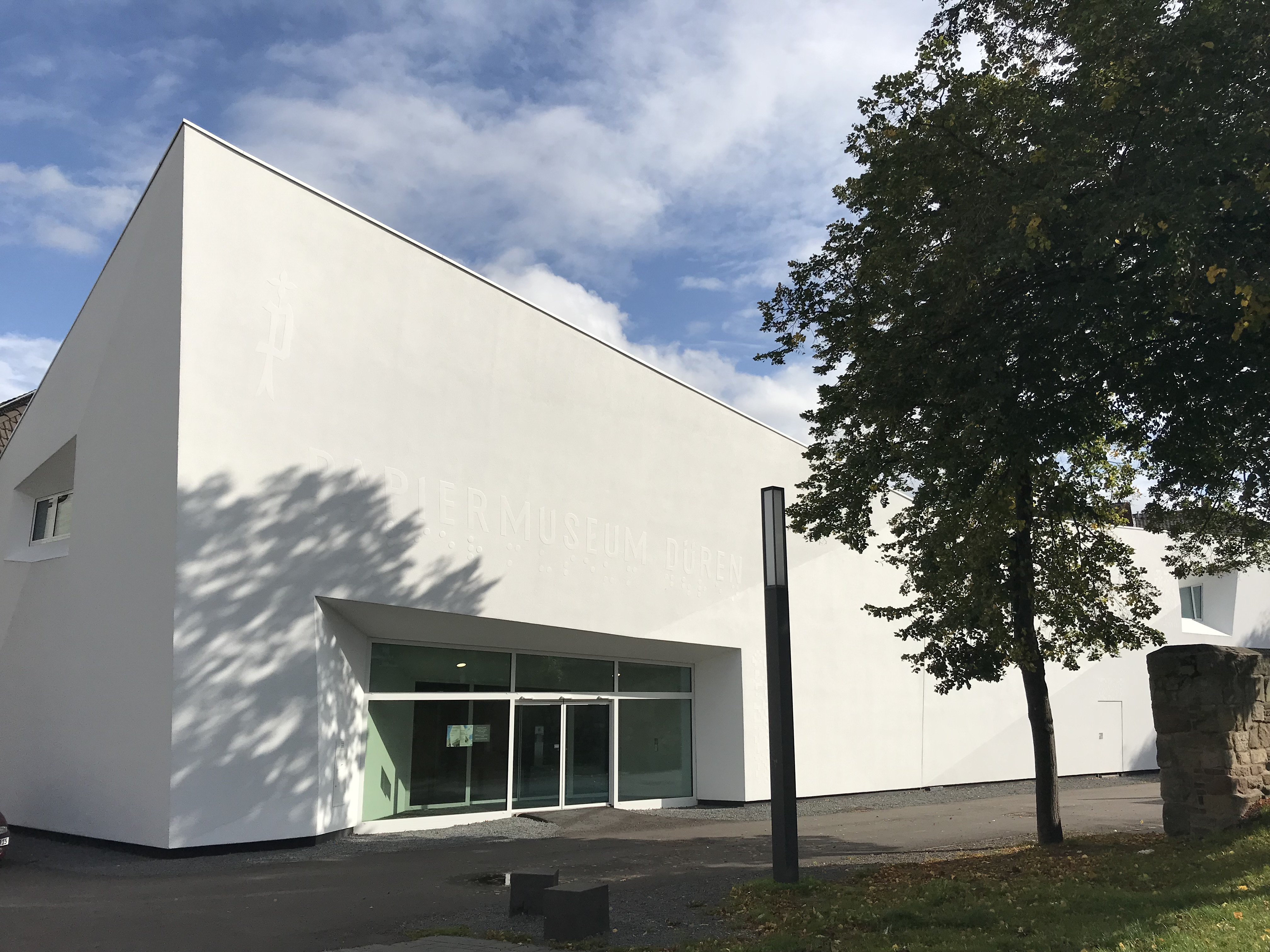 Das 2018 nach umfassender Neukonzeption und grundlegender architektonischer Erweiterung wiedereröffnete Museum widmet sich dem Werkstoff Papier, dessen Erzeugung und Verarbeitung eine jahrhundertelange Tradition in Düren hat. Neben der Architektur entwickelte Architekt Klaus Hollenbeck gemeinsam mit Kuratorin Caroline Kaiser auch die interaktive Gestaltung des Innenraums.